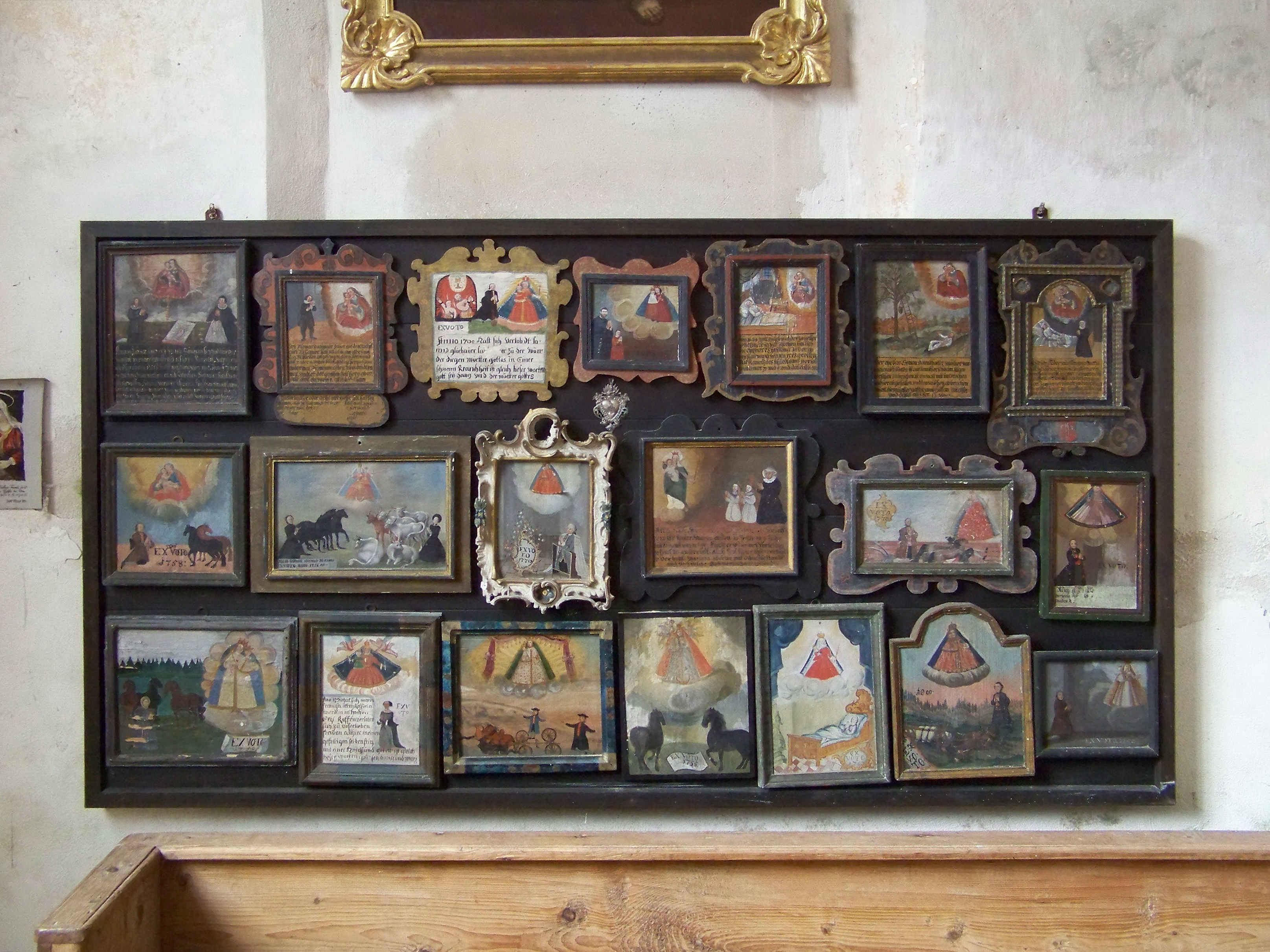 Adlkofen, Jenkofen 13. Katholische Kirche Mariä Himmelfahrt. Zahlreiche Votivtafeln erinnern an eine ehemals blühende Wallfahrt (von der Barockzeit bis ins 20. Jahrhundert) und zeugen von vielen wundersamen Gebetserhörungen.